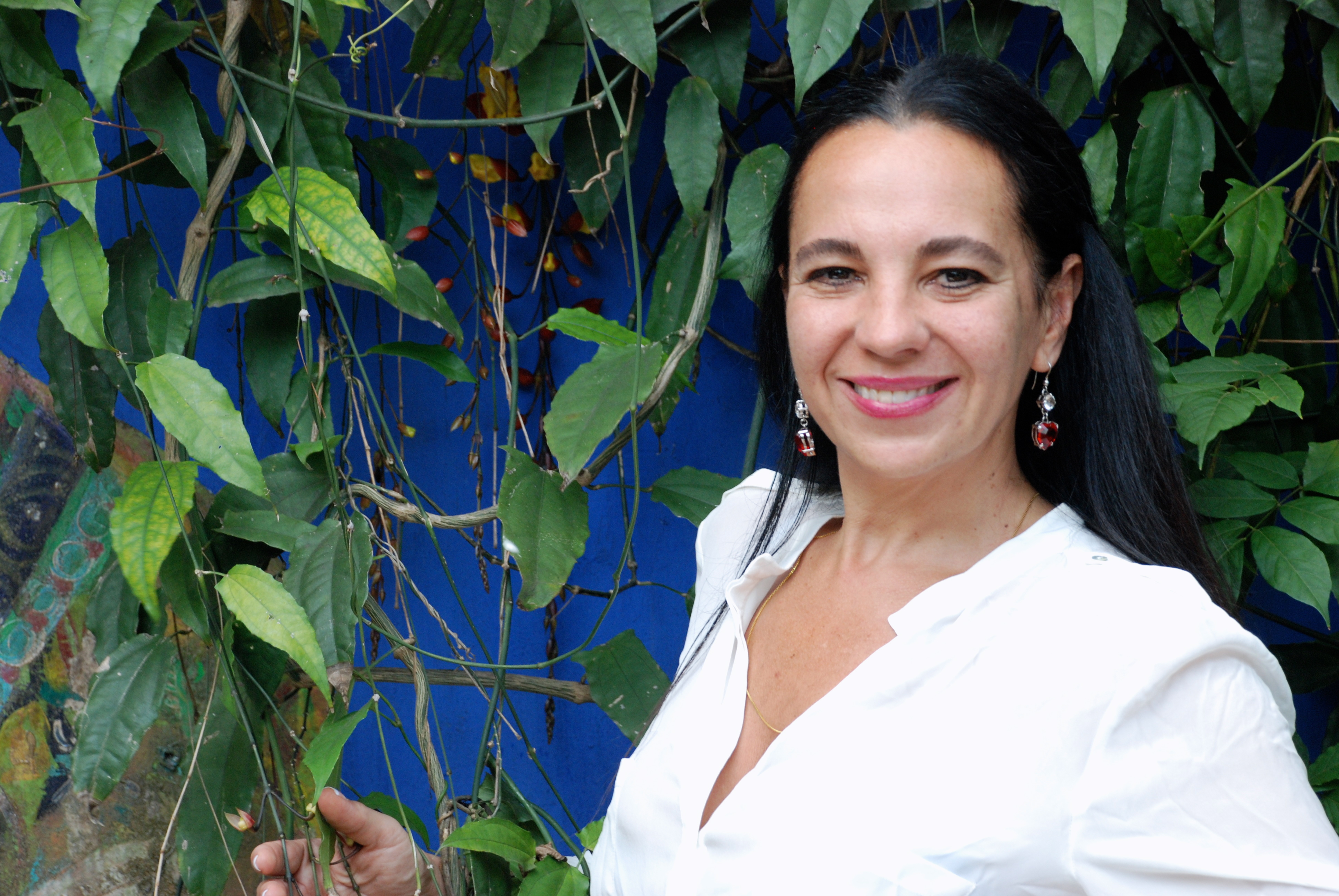 Isabelle Tuchband no seu Atelier em São Paulo - 2012